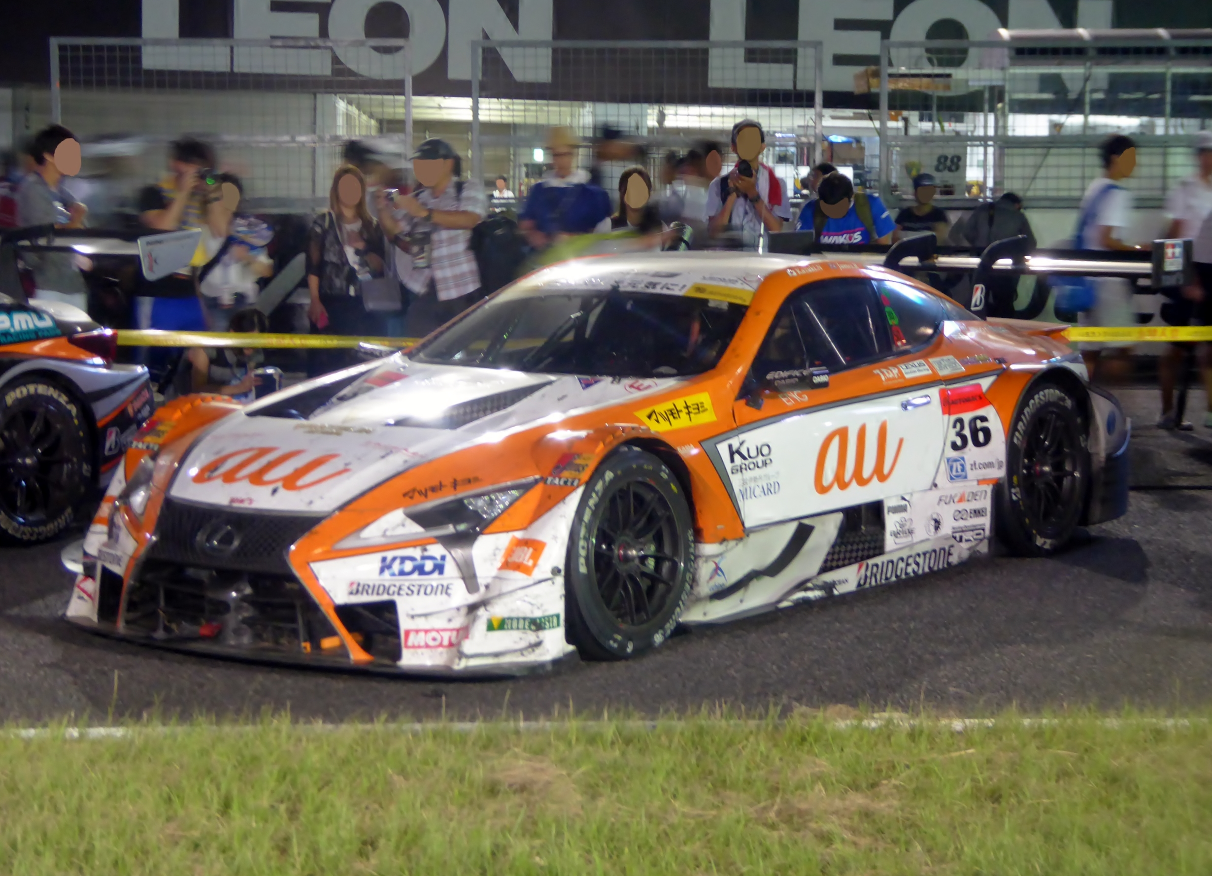 2017年鈴鹿1000km終了後の36号車au TOM'S LC500を撮影。